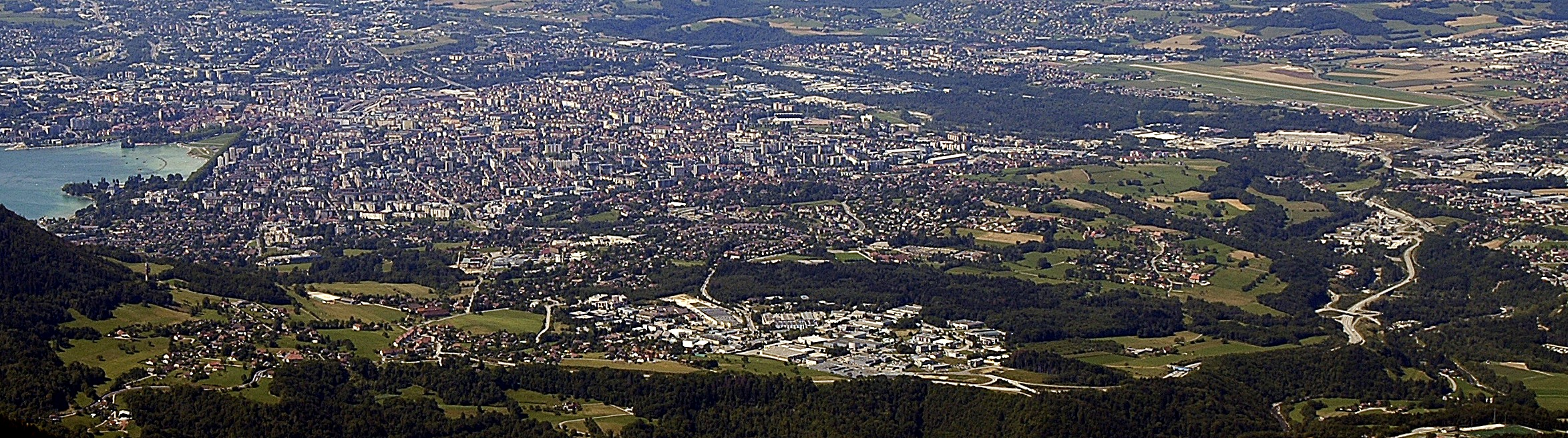 L'agglomération d'Annecy-le-vieux vue depuis le haut du Parmelan (sauf le quartier du Petit-Port, masqué par les contreforts du Mont Veyrier). Au fond, Annecy puis Cran. À droite, on distingue bien la piste de l'aéroport de Meythet, ainsi que les zones industrielles de Pringy/Metz-Tessy.